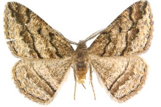 Pterospoda nigrescens